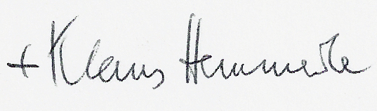 Signatur seines Briefes an mich vom 19.7.1993